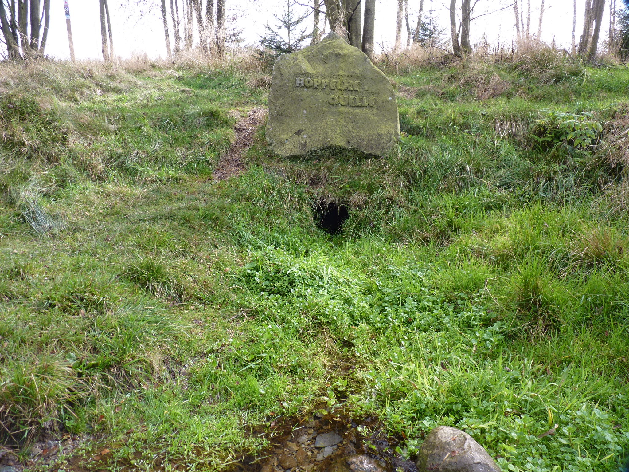 Quelle der Hoppecke mit Quellstein im Hintergrund